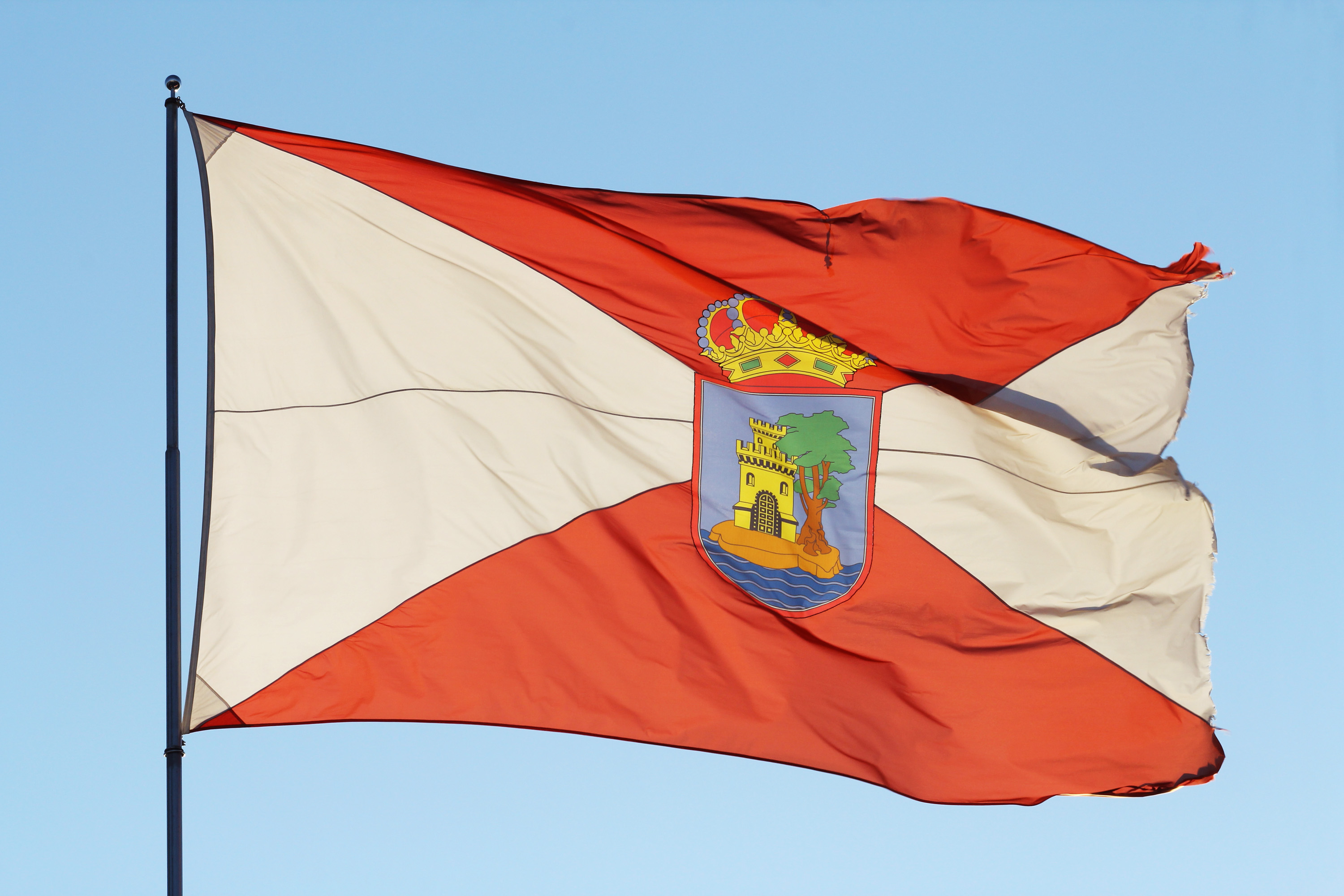 Bandeira da cidade de Vigo.